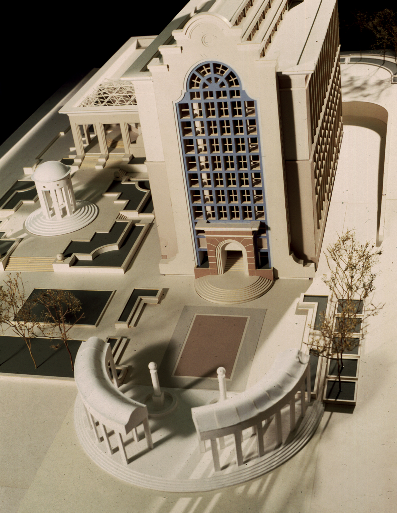 Гостиница Интурист в Пензе. Проект. Общий вид. 1983-1989г.г. Руководитель авторского коллектива Петр Войс.